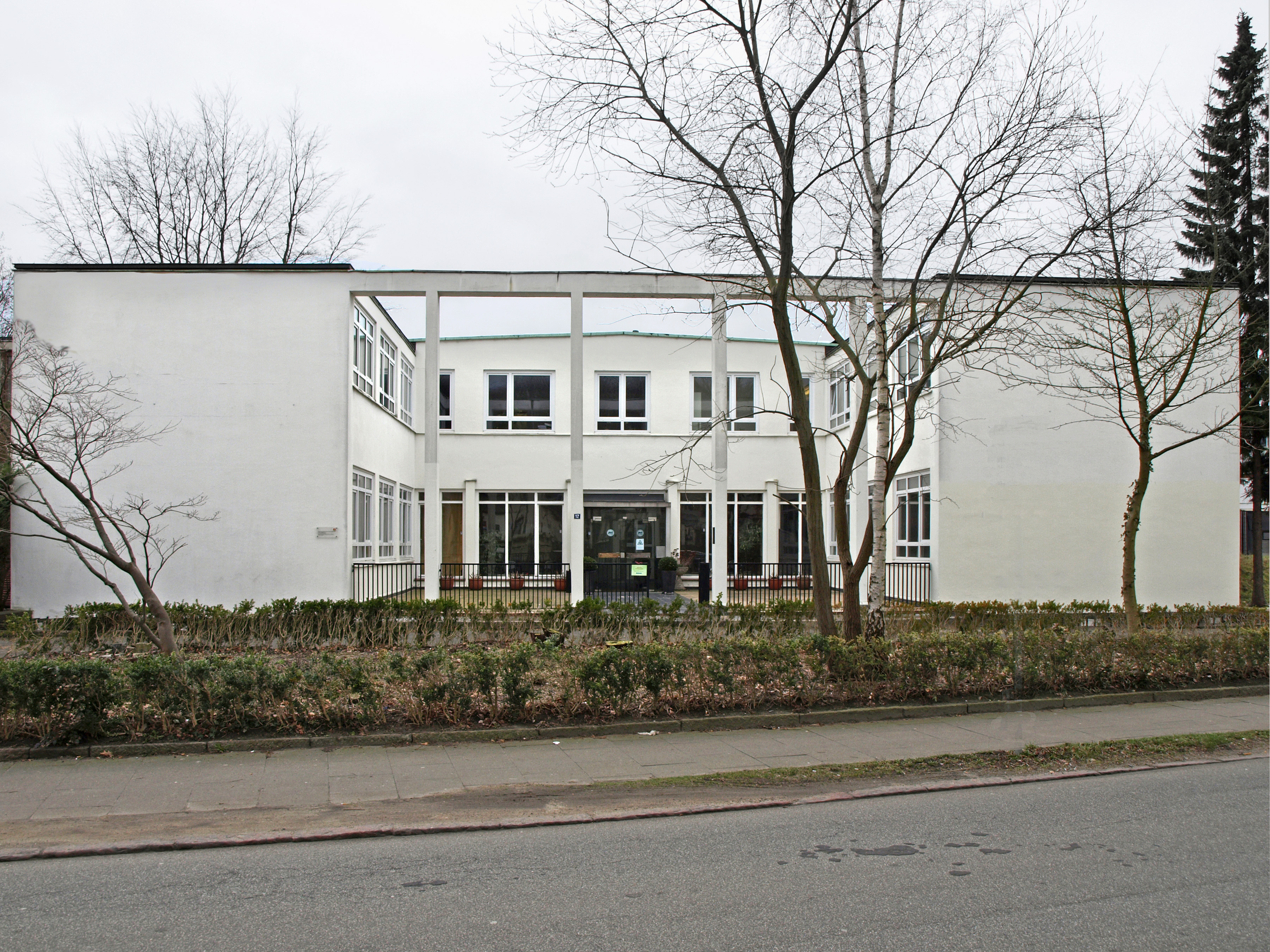 Pinneberg - An der Mühlenau 13 - Empfangsgebäude der ILO-Motorenwerke - Erbaut 1932 im Bauhausstil nach Entwurf von Architekt Rudolf Lodders - This is a photograph of an architectural monument.